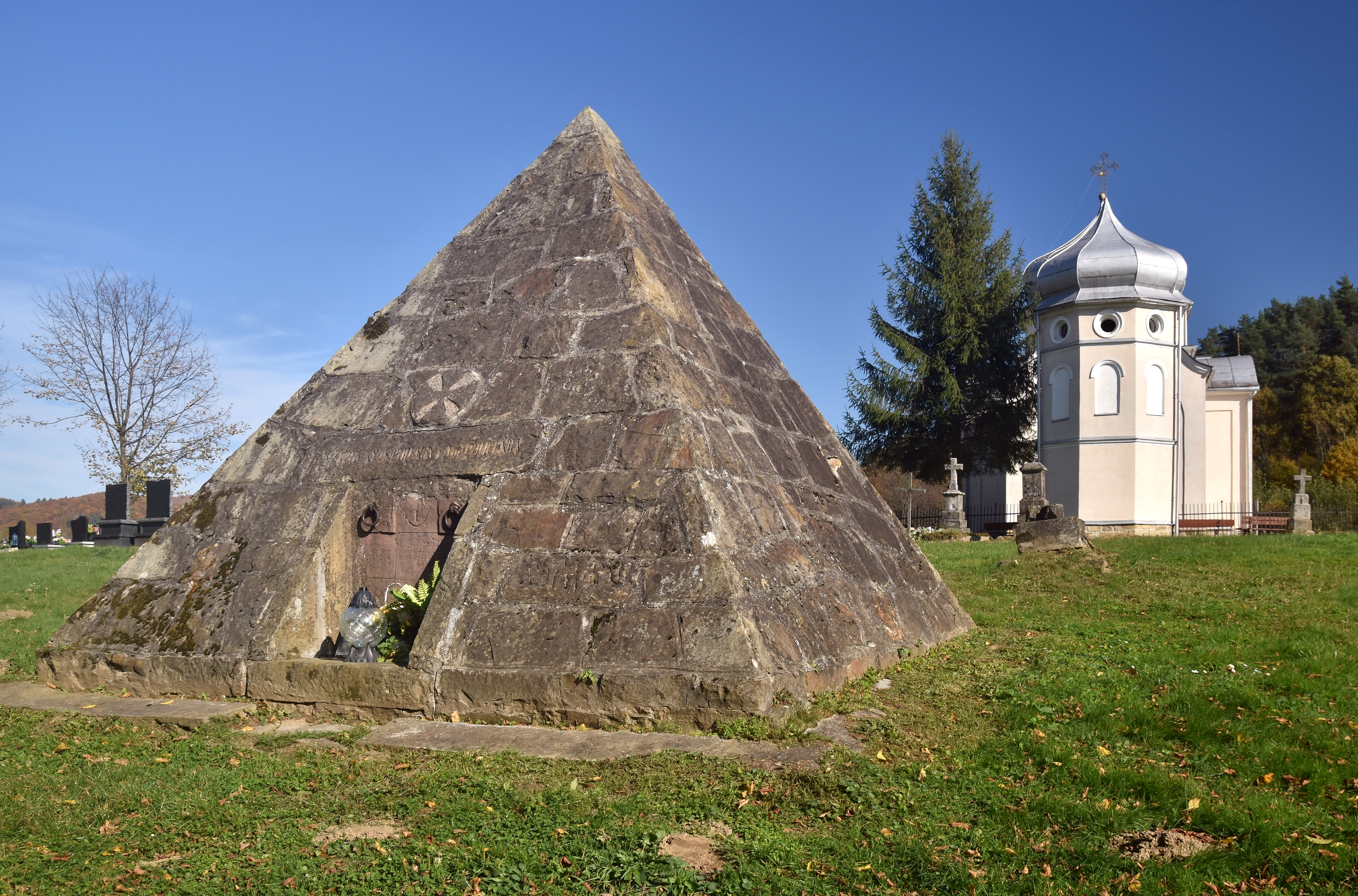 wieś Międzybrodzie